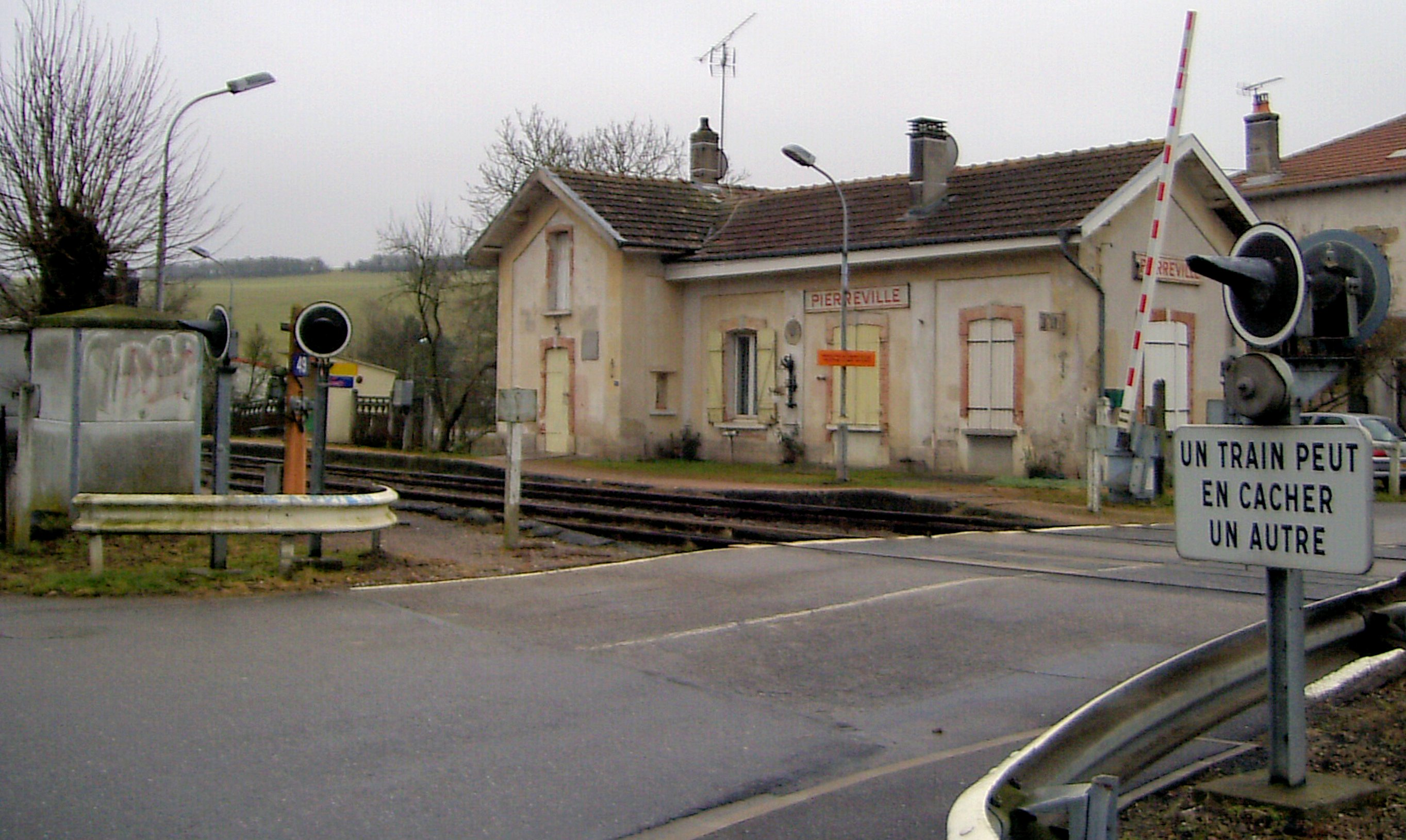 Gare de Pierreville